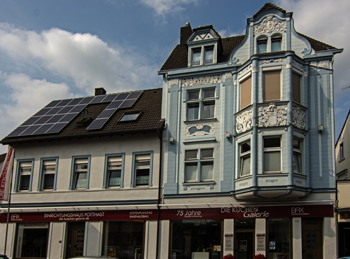 Wohnhaus von Alber u. Henriette Cohen und Sophie Levy in der Schüruferstr. 328